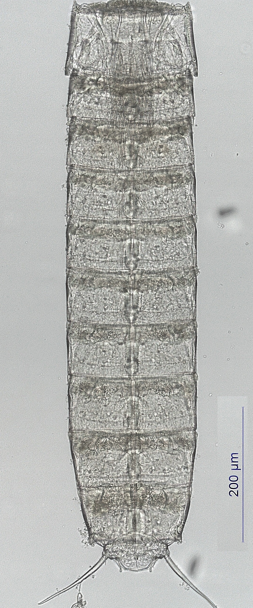 PPycnophyes zelinkaei